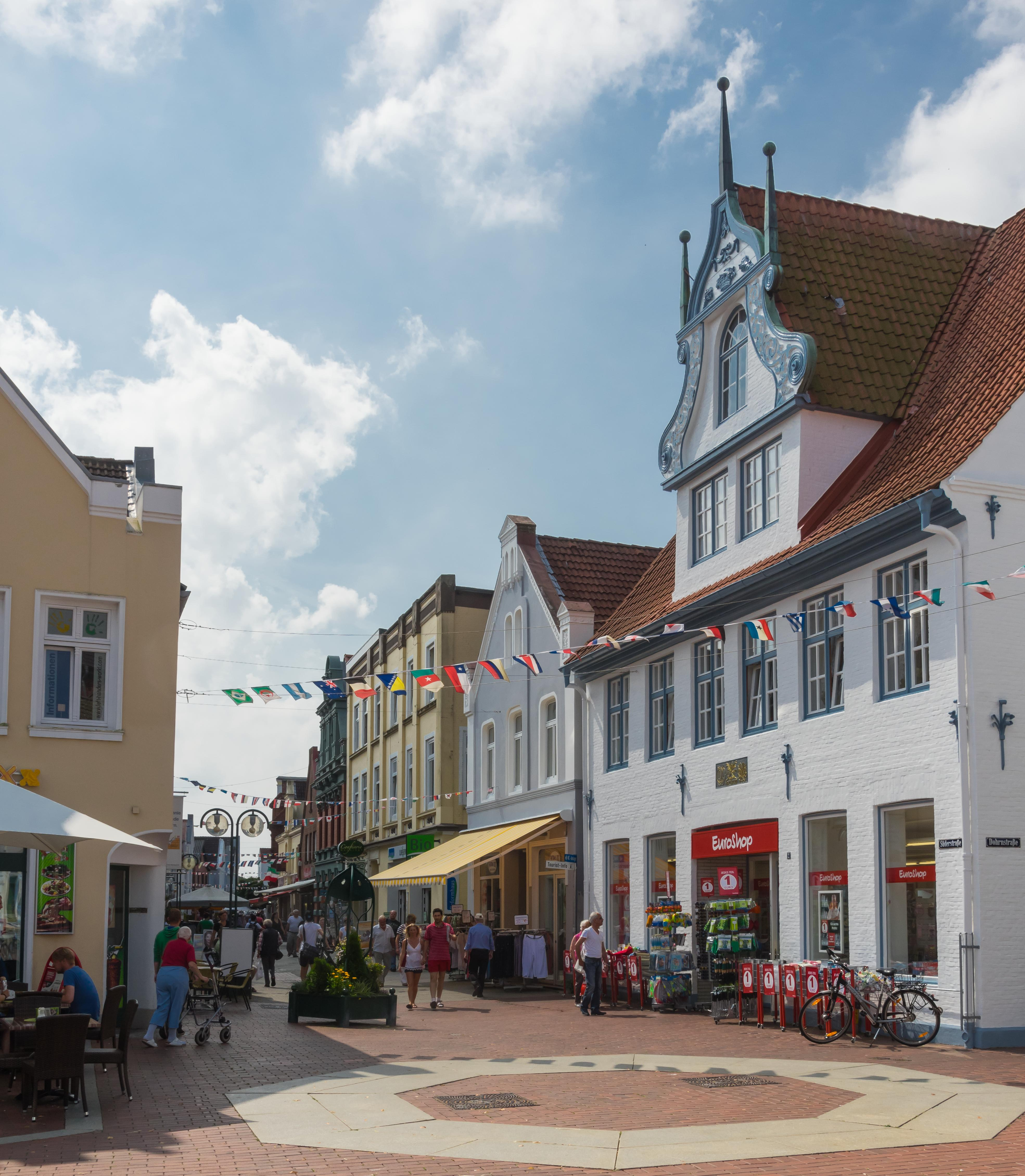 Bilder aus Heide (Holstein) Süderstraße mit dem "Dreetörn Hus"